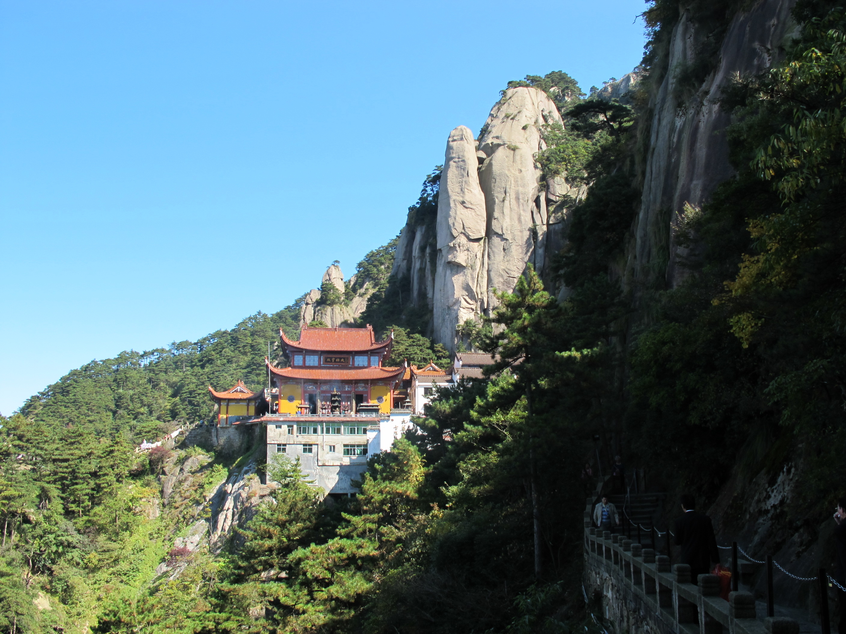 九华山半山腰的古拜经台